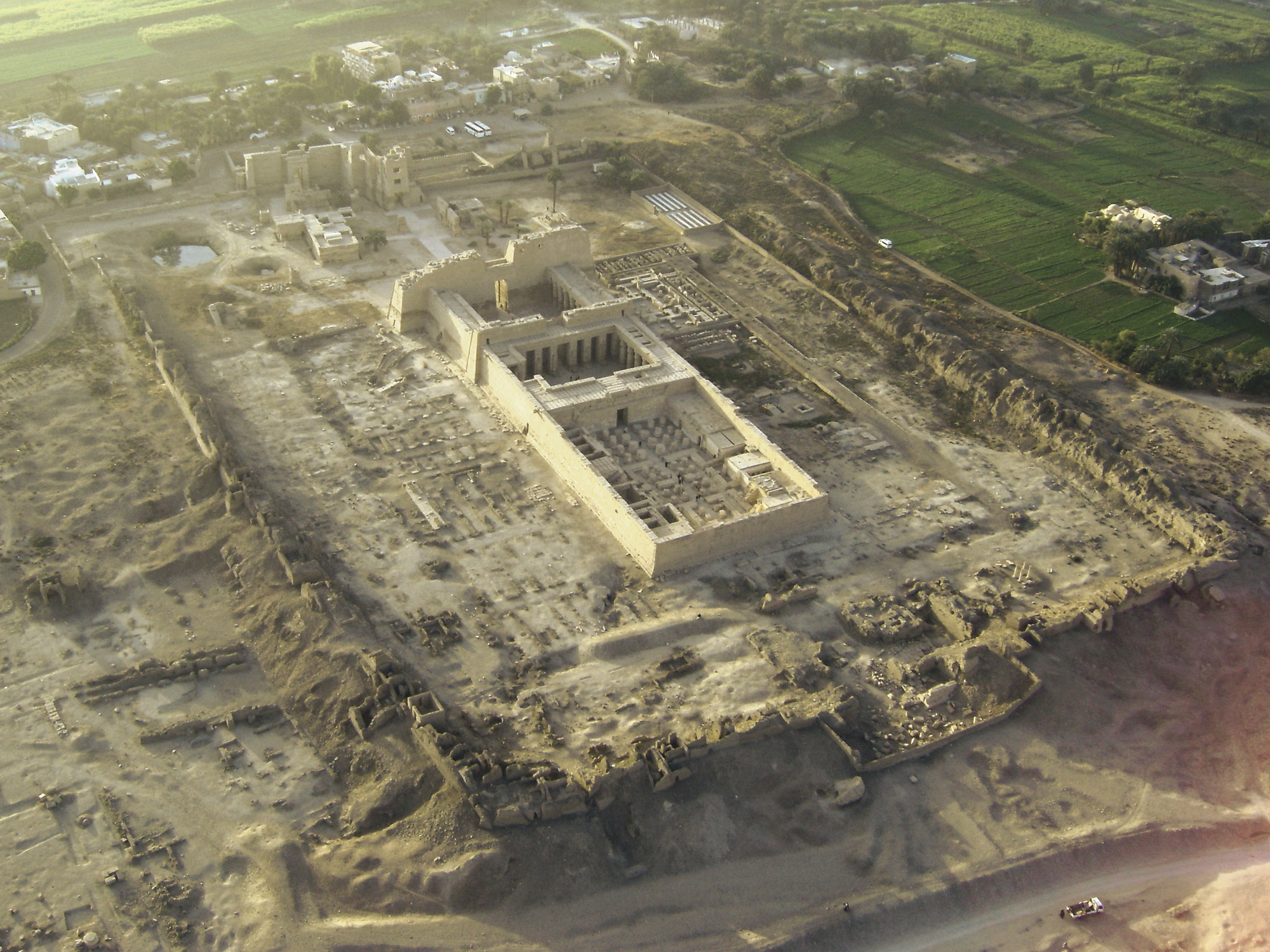 Medinet Habu Temple Luftbild From Above